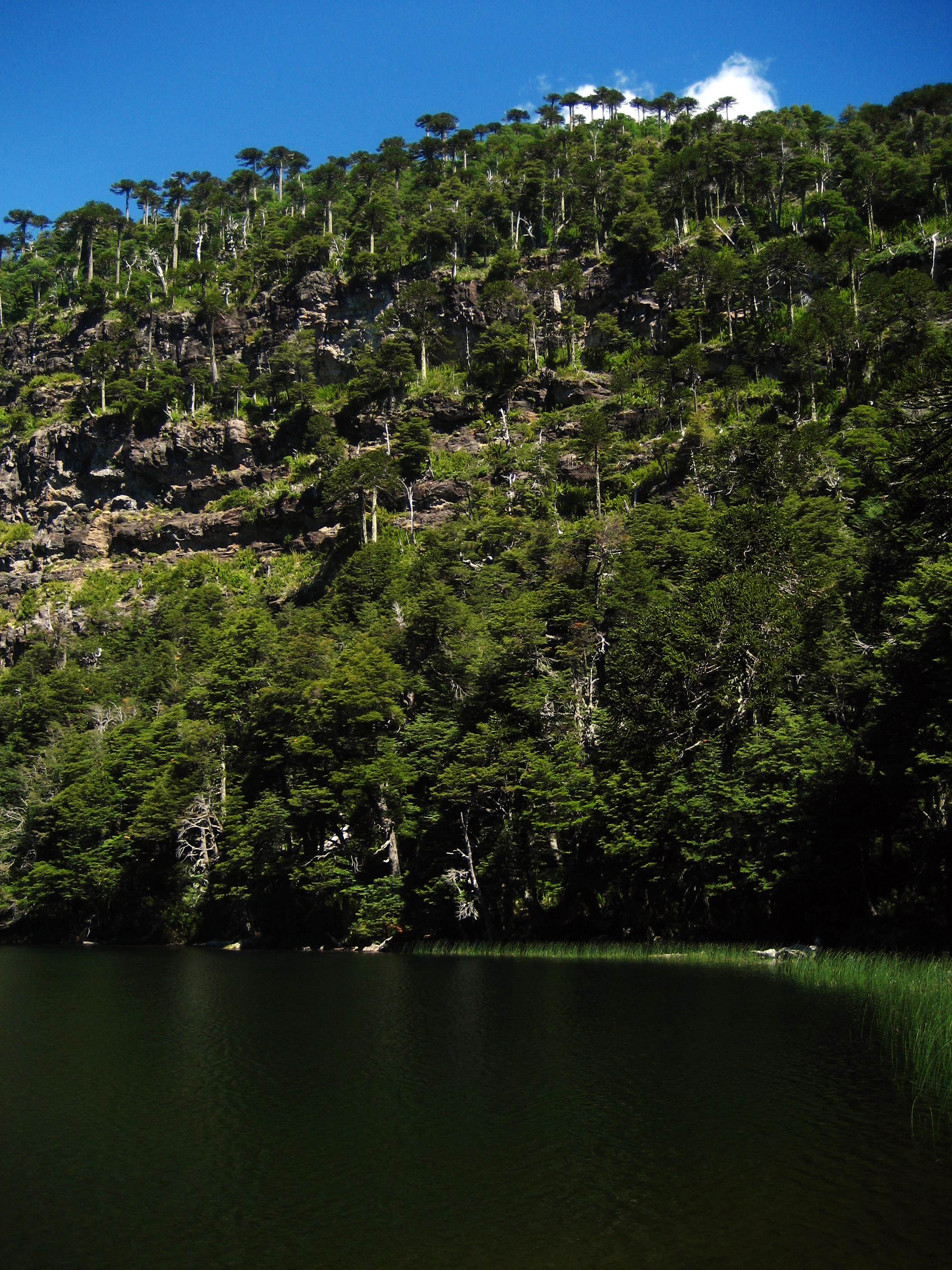 Laguna Verde, Tolhuaca National Park, Chile.